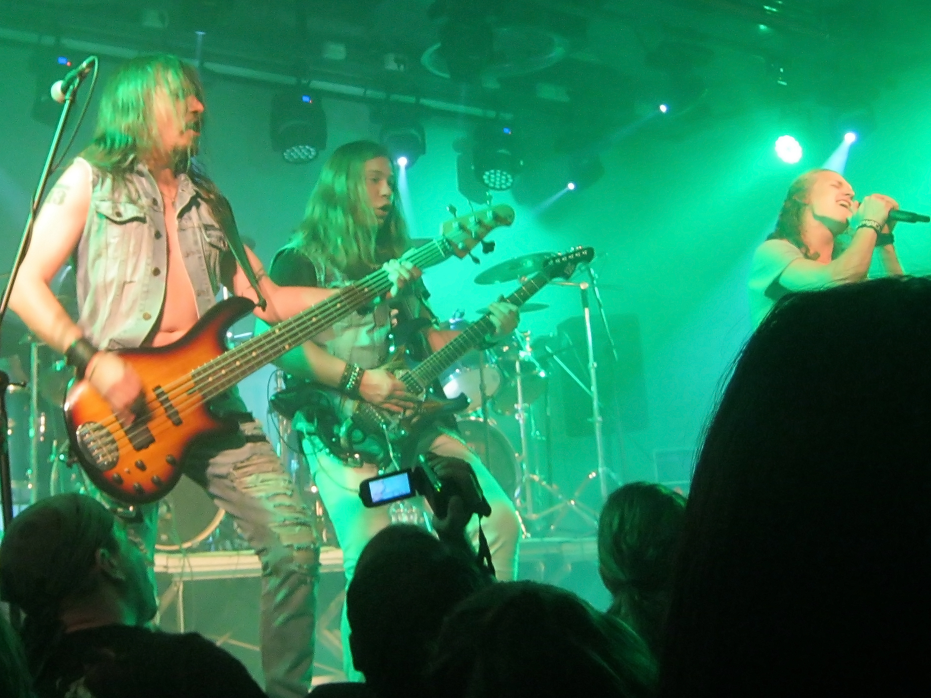 Russian Power Metal band Epidemia in Israel, 2015